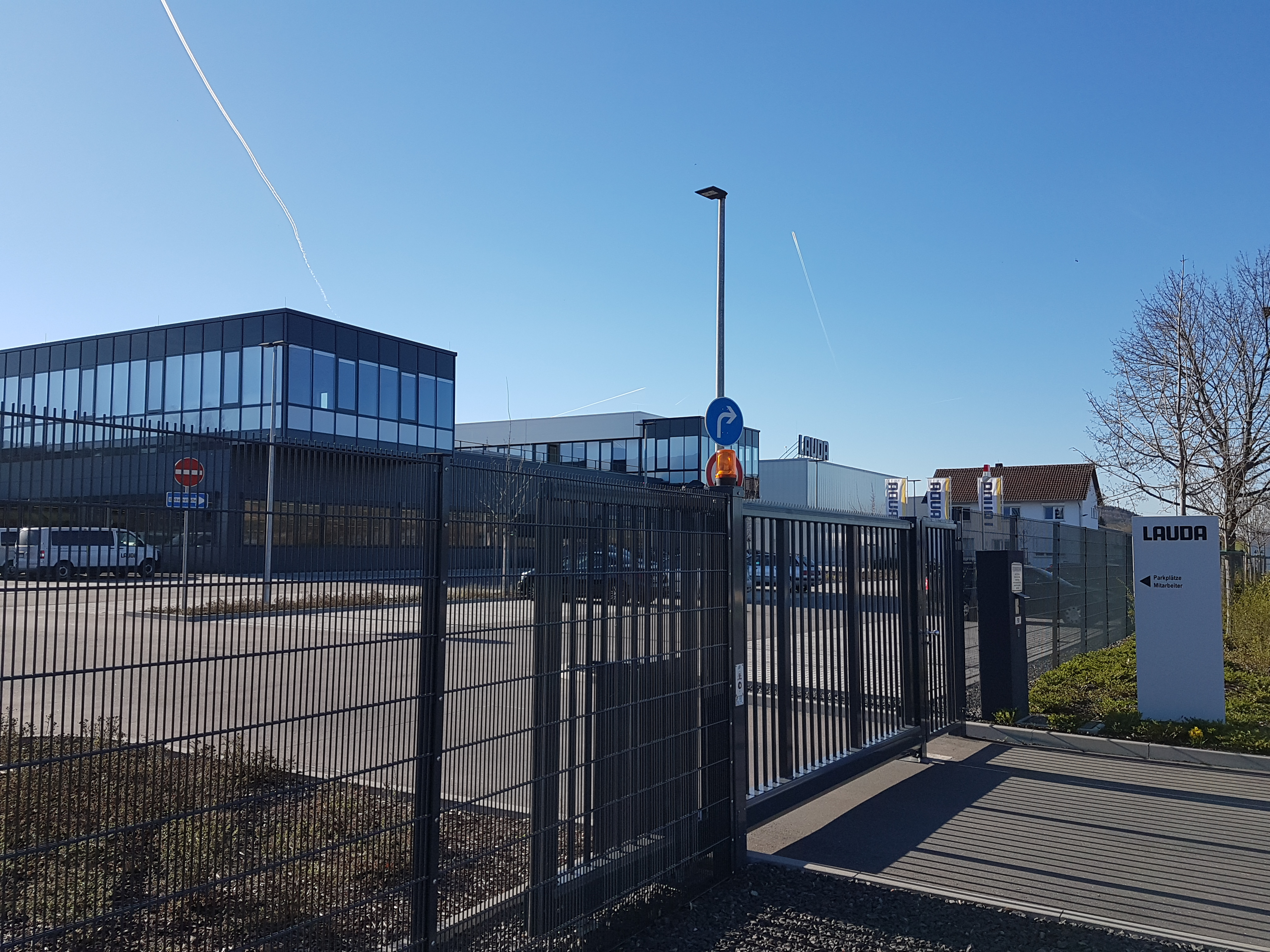 Lauda Dr. R. Wobser GmbH & Co. KG